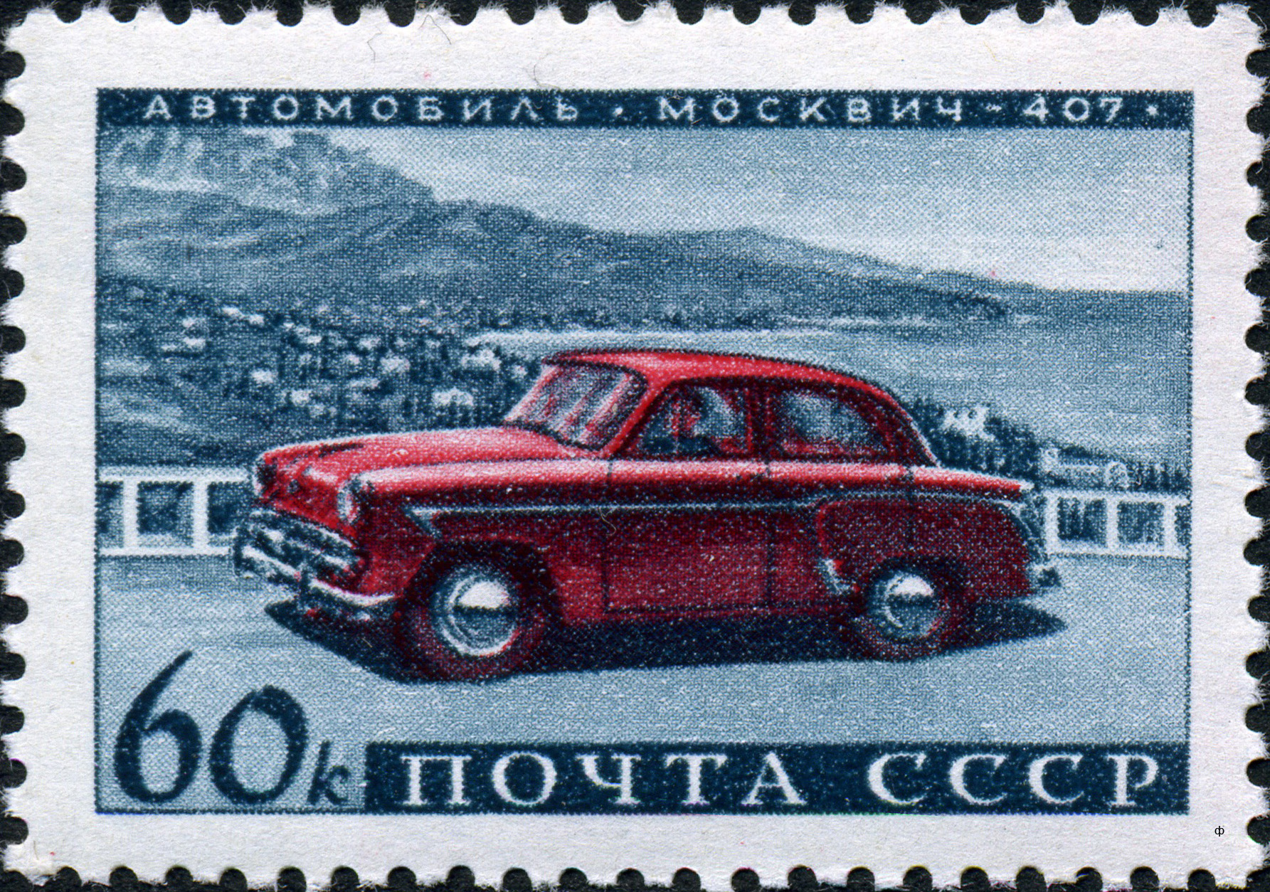 Марка СССР